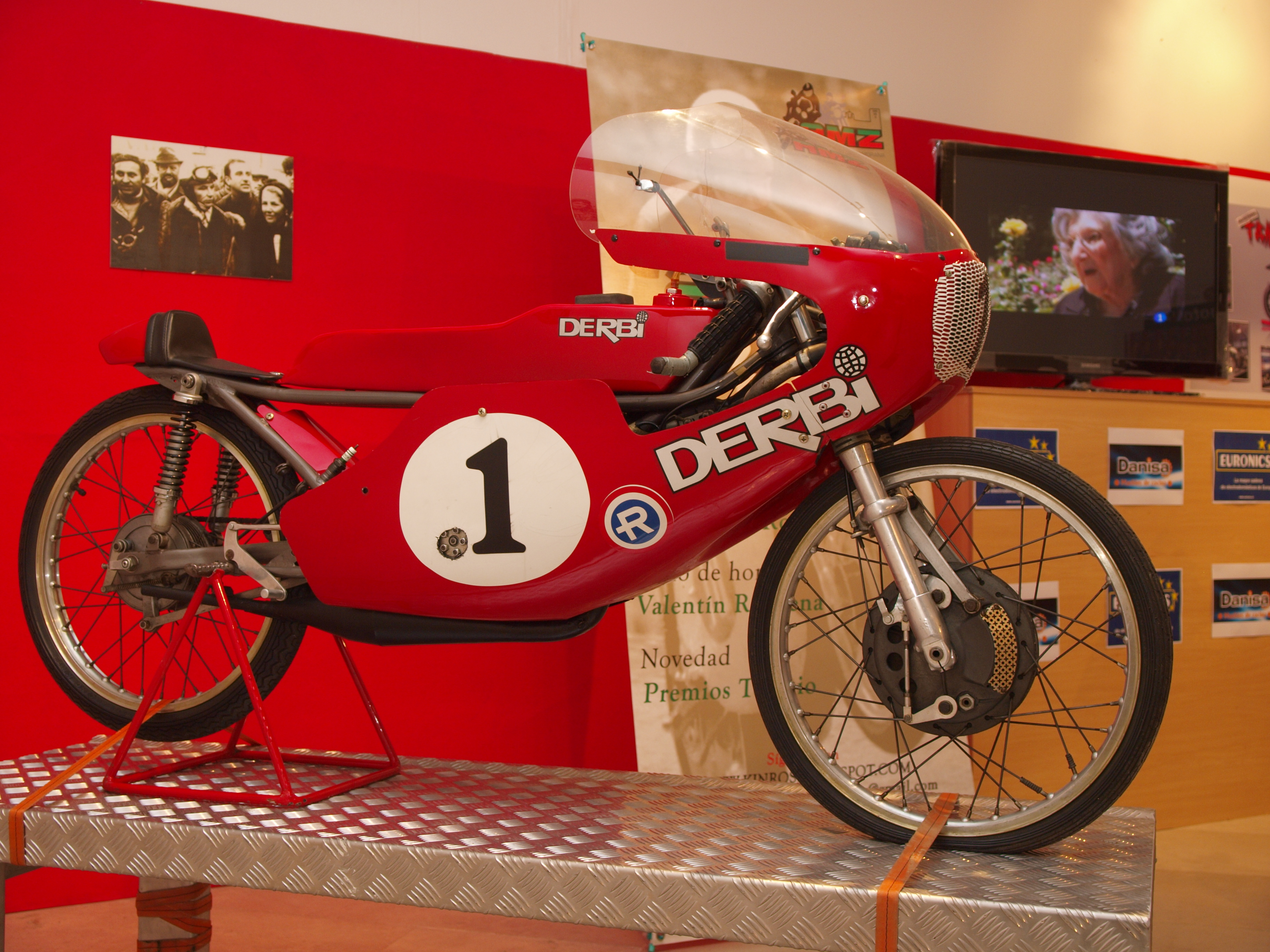 Derbi de 50 cc, campeona del mundo en 1969, 1970 y 1972 con Angel Nieto